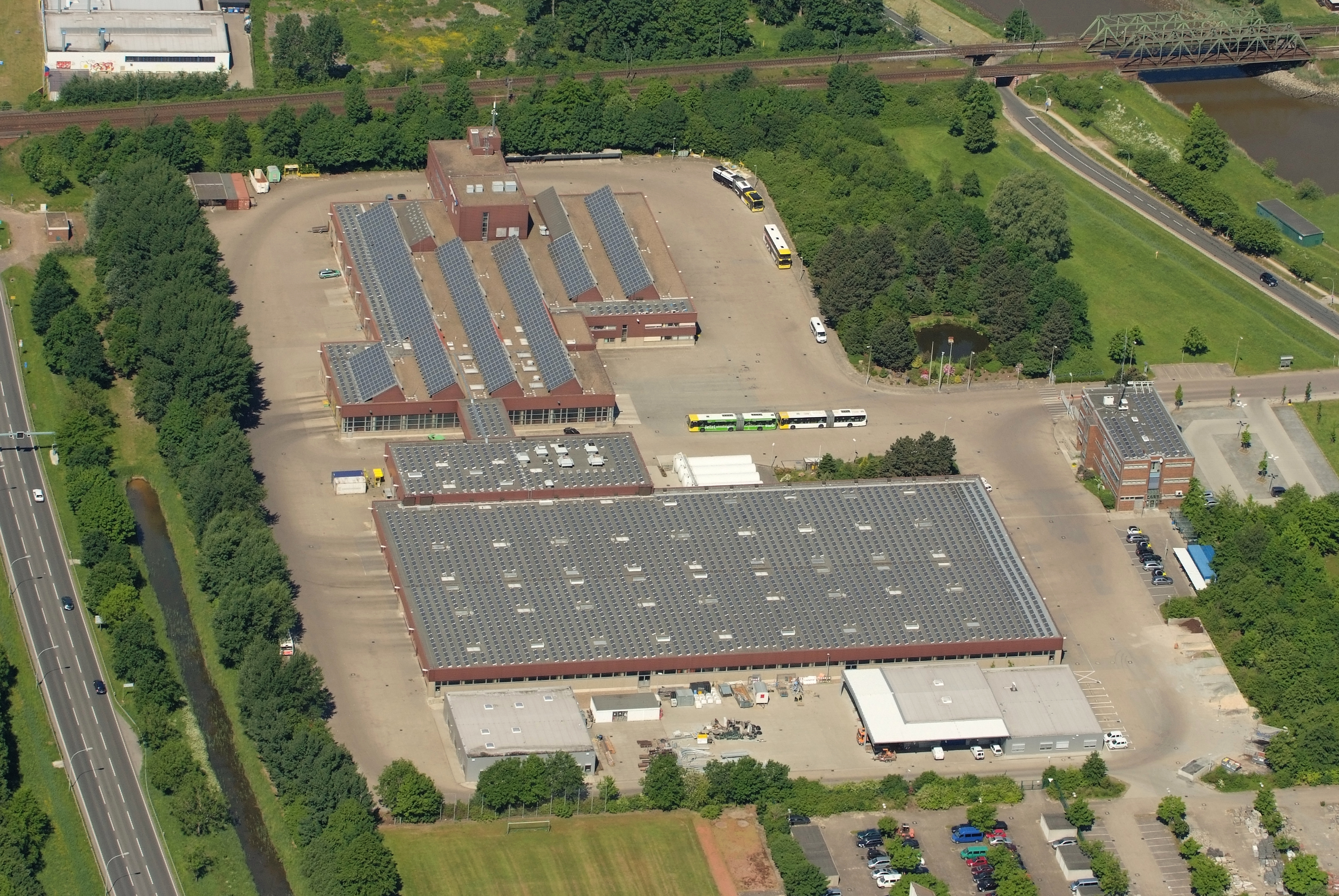 Sitz der VGB, heute BremerhavenBus Fotoflug vom Flugplatz Nordholz-Spieka über Cuxhaven und Wilhelmshaven